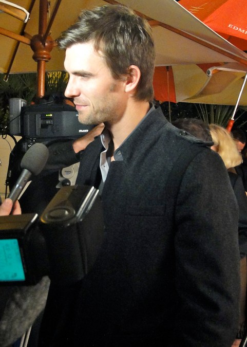 L'attore canadese Lucas Bryant intervistato il 4 ottobre 2010 al MIPCOM di Cannes.